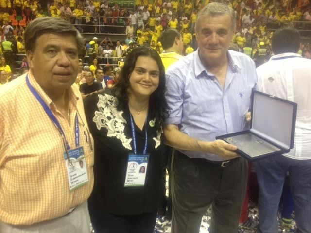 Membros da Associação Mundial de Futsal, no II Mundial Feminino de Futebol de Salão AMF, na Colômbia em 2013.